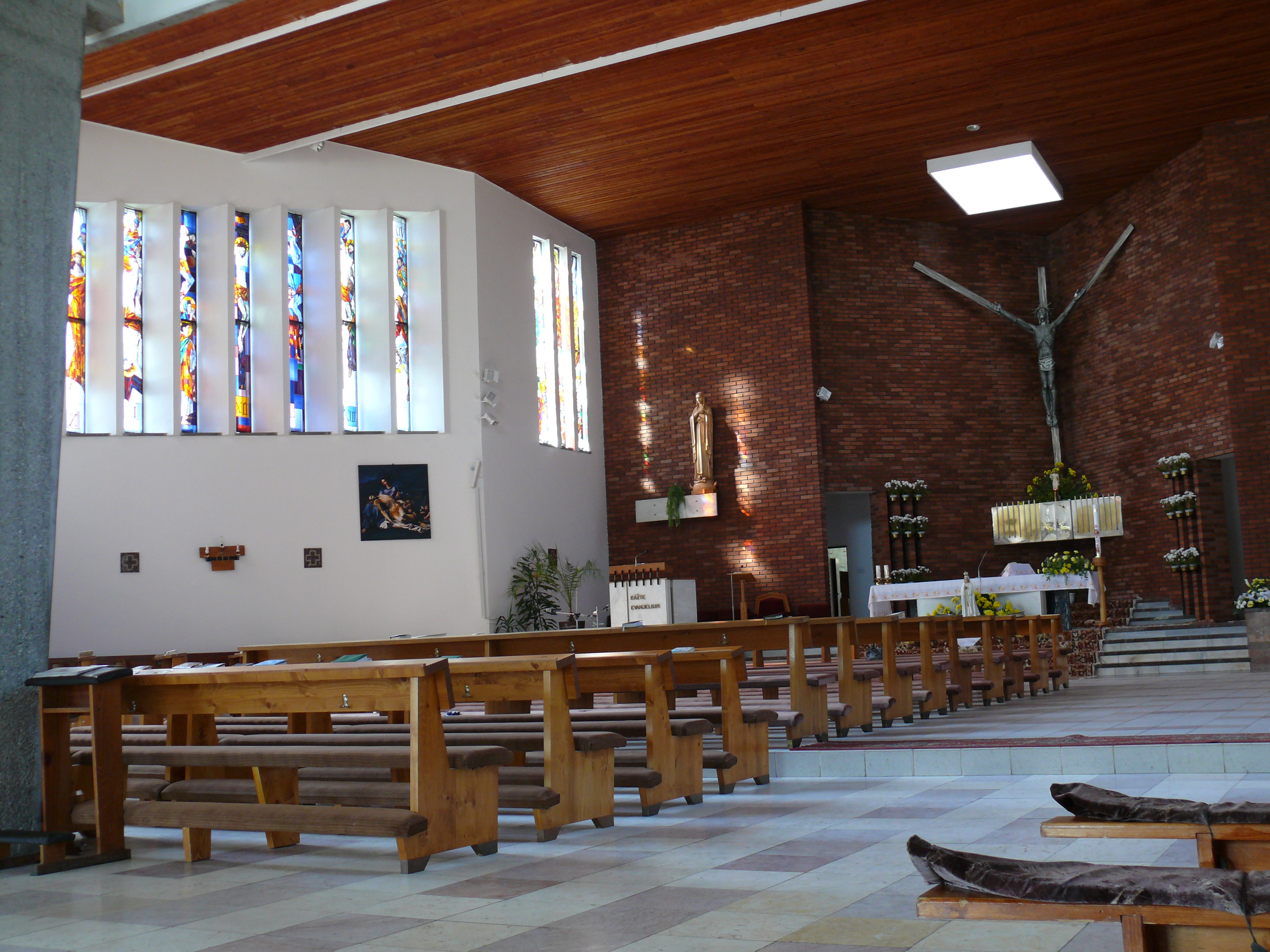 Church, Zborov nad Bystricou, Slovakia